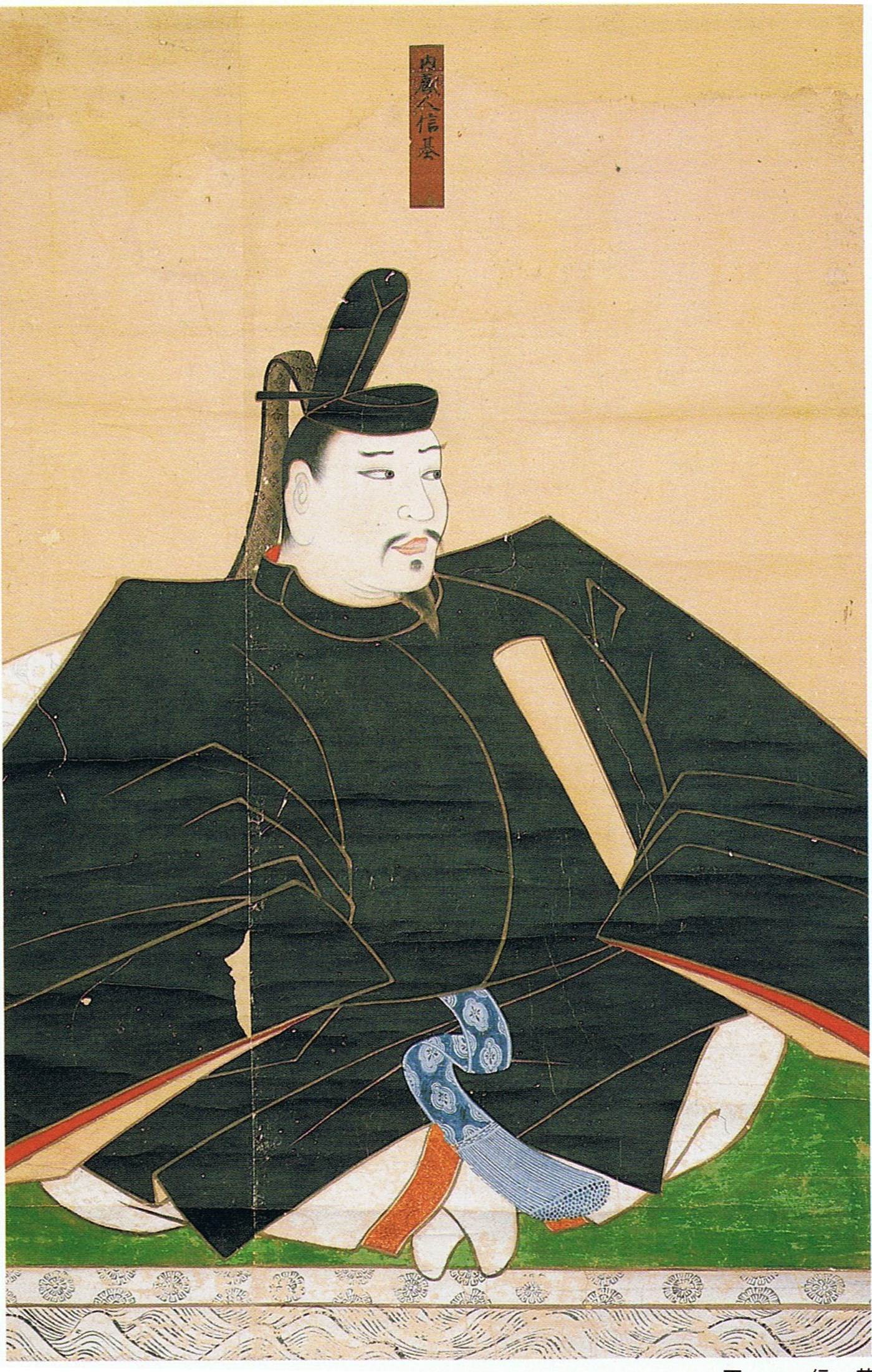 平信基像